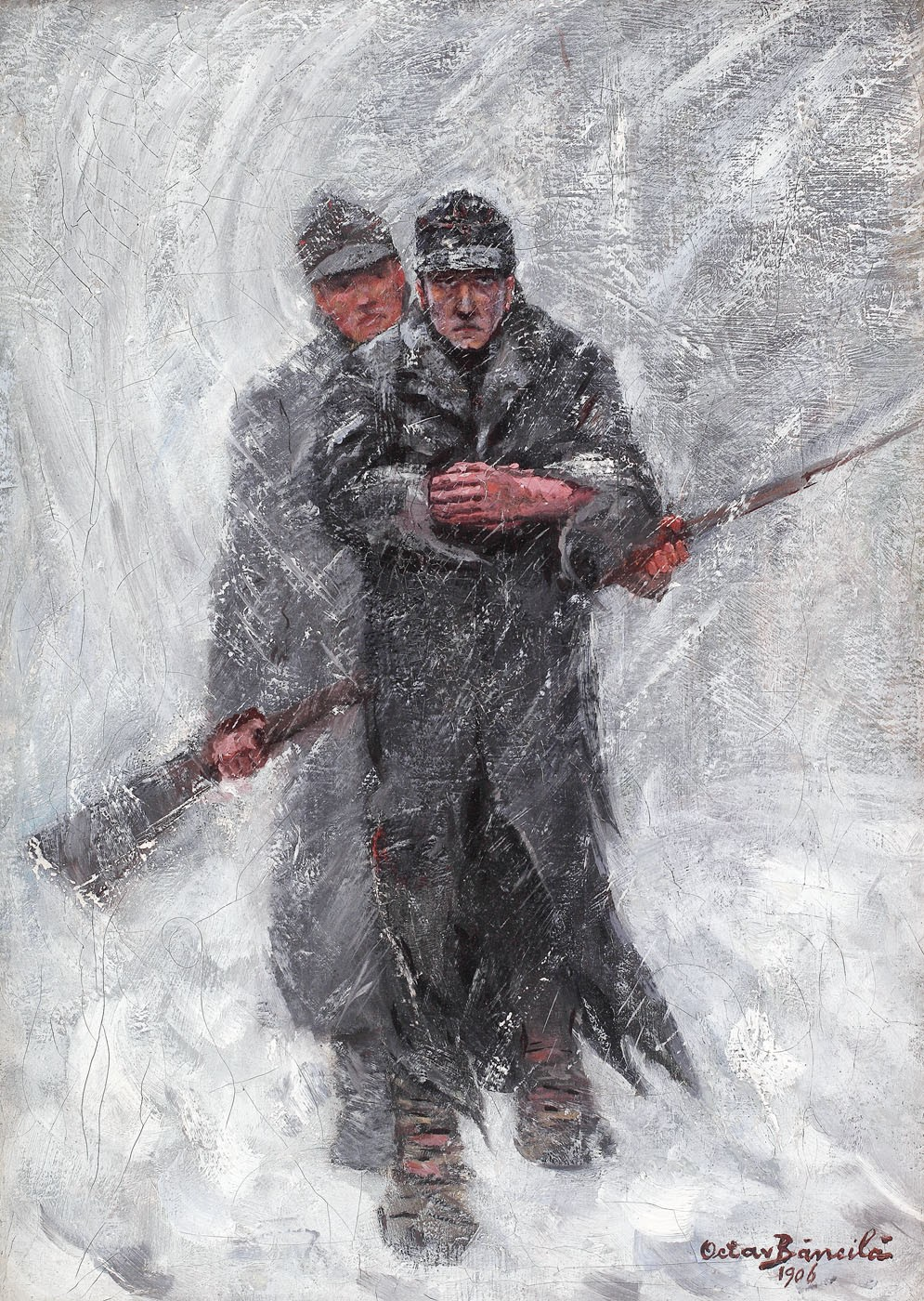 The Defector by Octav Băncilă, ulei pe pânză, 54 × 32 cm, semnat și datat dreapta jos, cu brun, Octav Băncilă, 1906